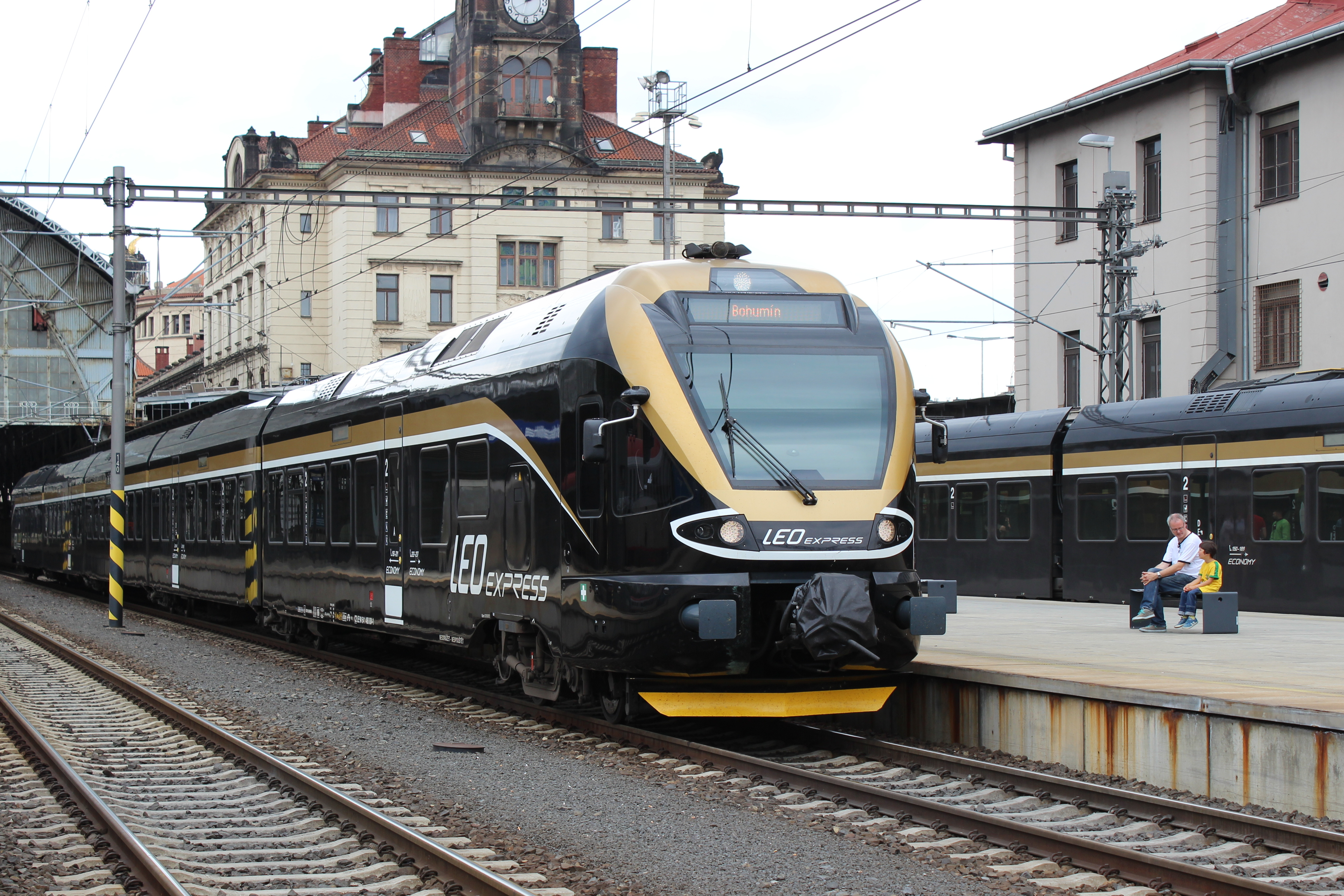 Souprava společnosti Leo Express na pražském Hlavním nádraží.